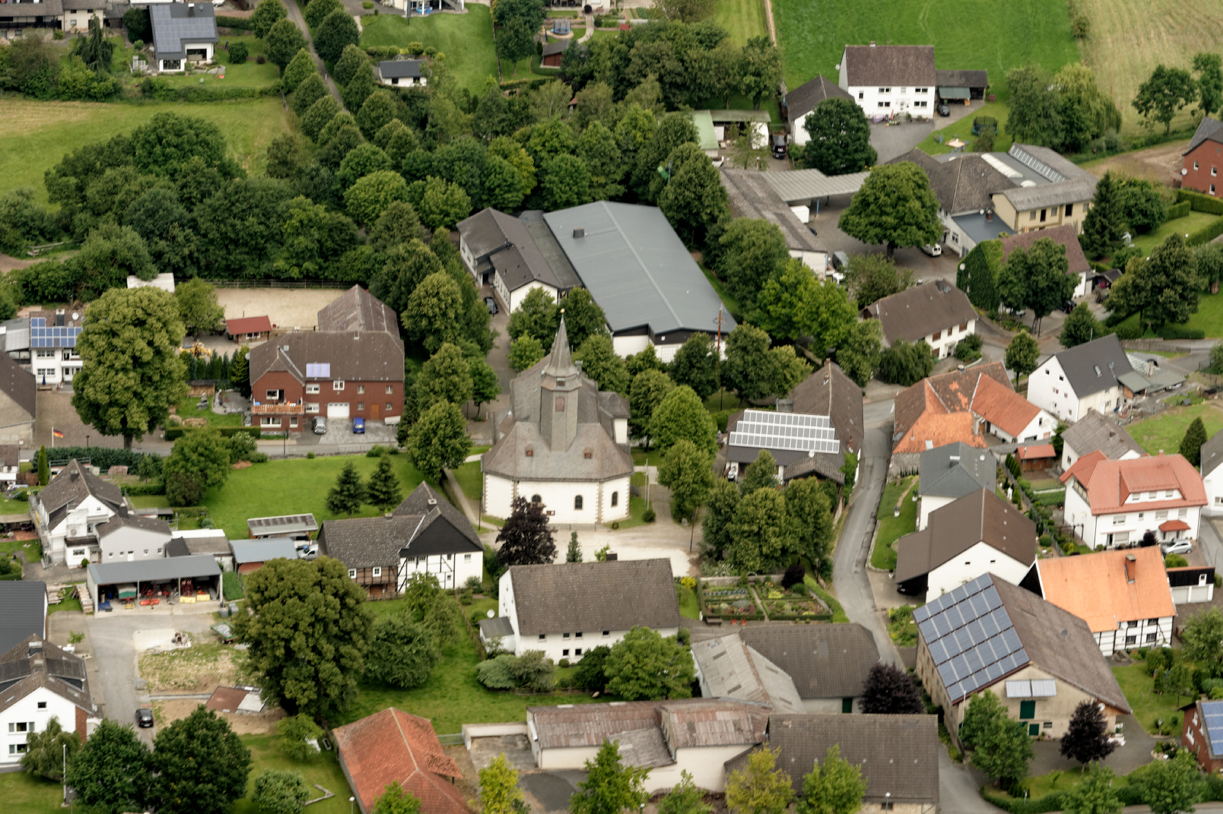 Fotoflug Sauerland Nord. Pfarrkirche St. Hubertus in Rüthen-Drewer, Blickrichtung Nord The making of this document was supported by the Community-Budget of Wikimedia Germany.